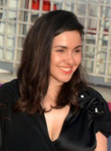 Alice Vial au festival du film de Cabourg